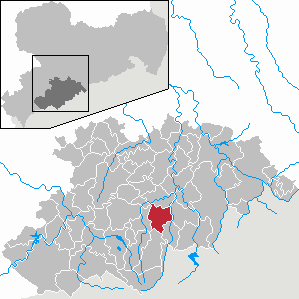 Annaberg-Buchholz im Erzgebirgskreis, Sachsen